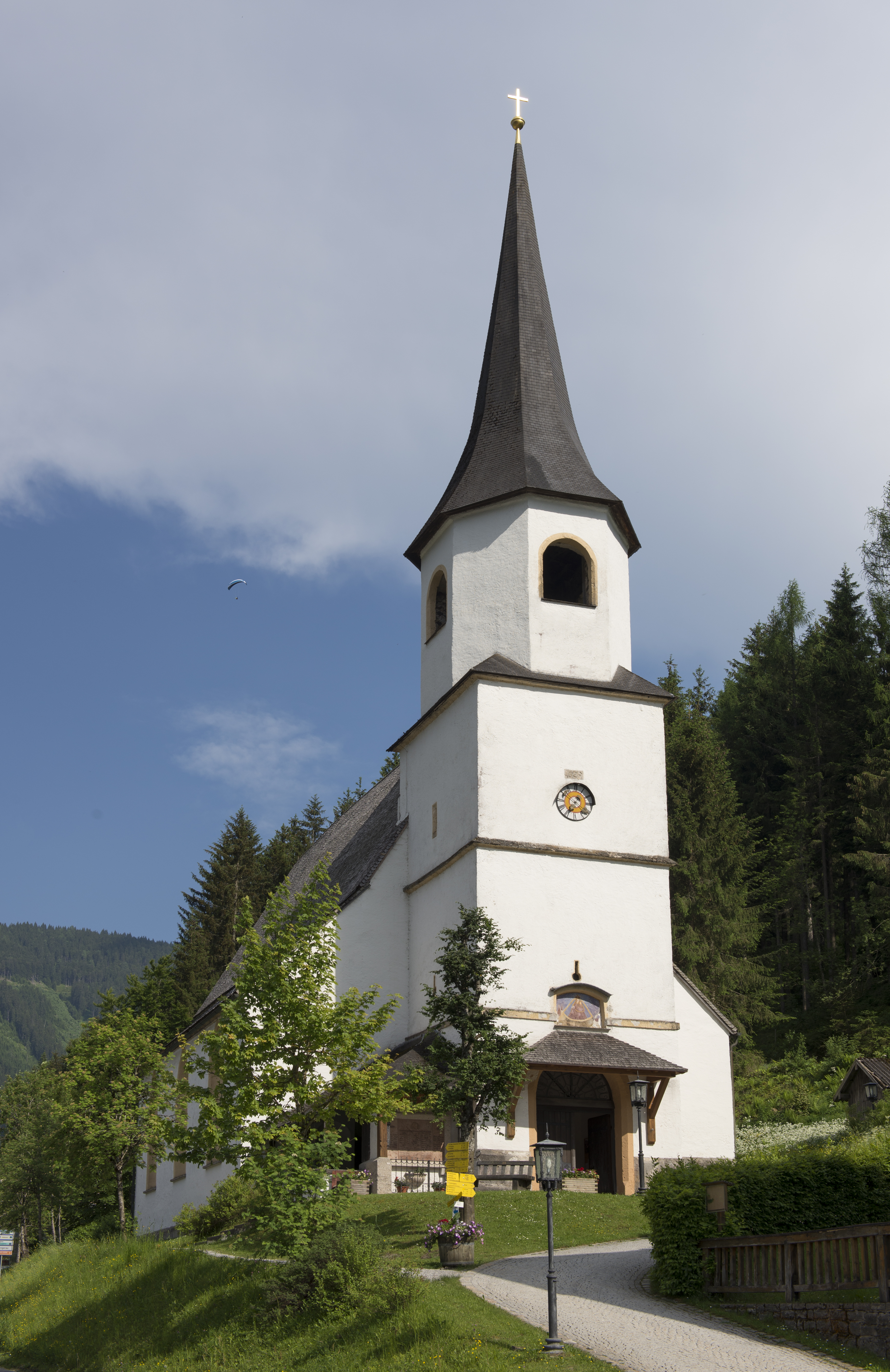 Kath. Pfarrkirche, Mariae Geburt